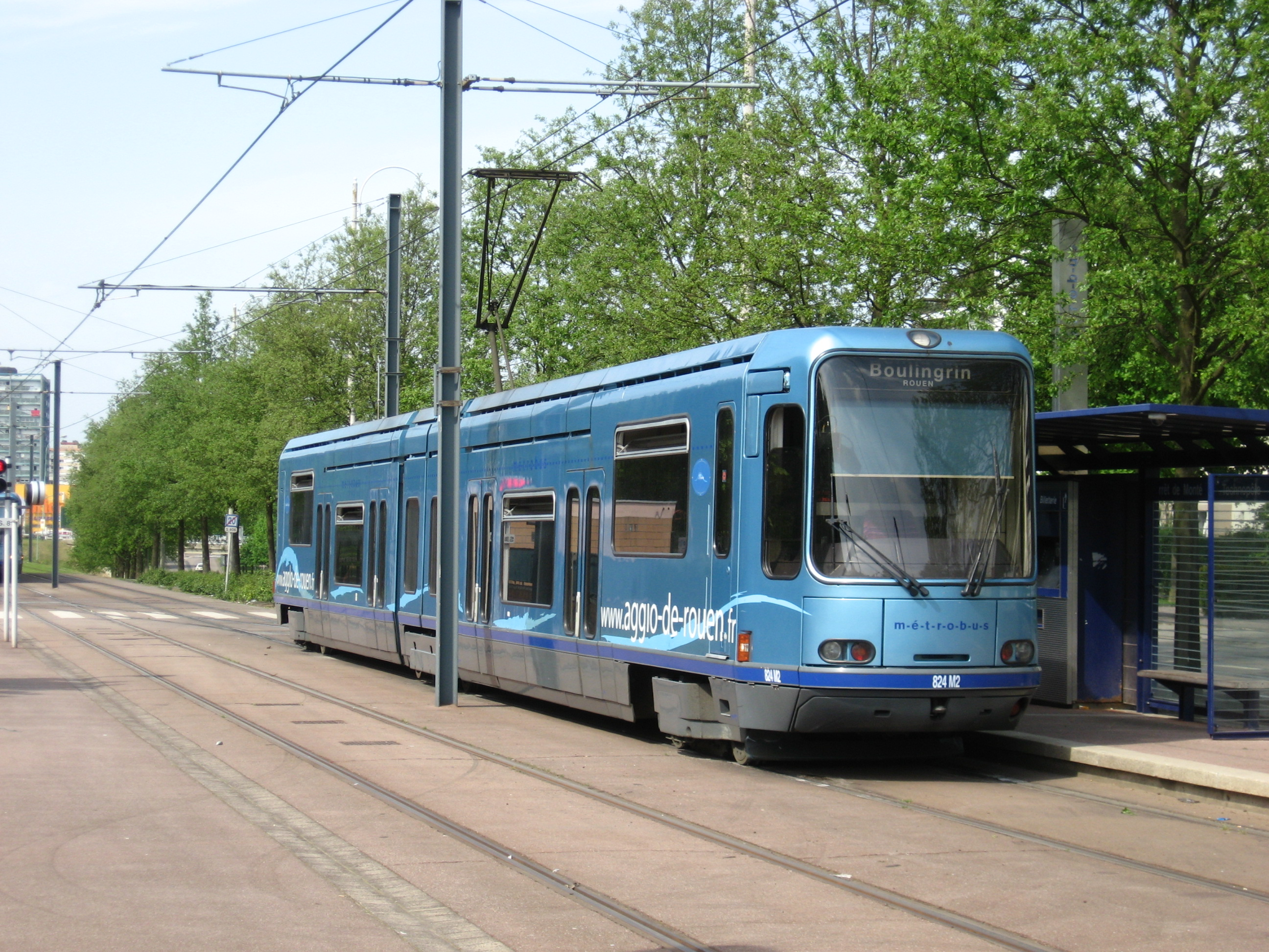 Rouen Standard Francais trams in 2008.